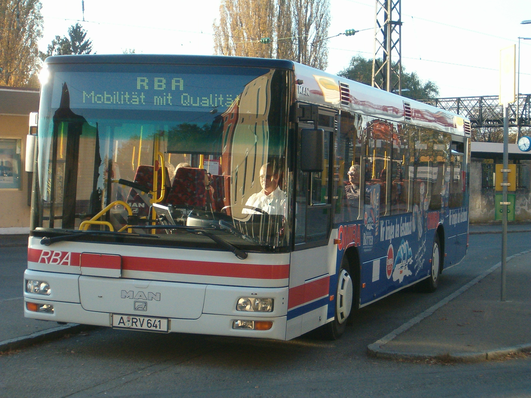 MAN in Lindau